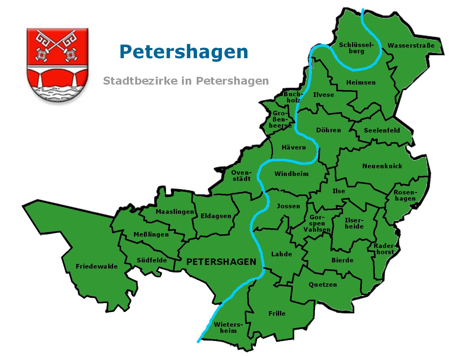 Stadtbezirke in Petershagen